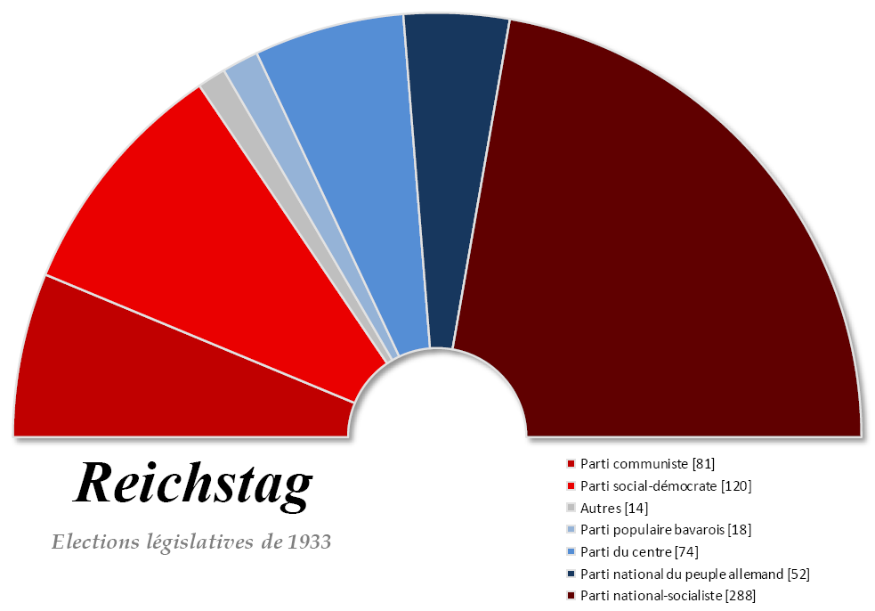 Composition du Reichstag à la suite des élections fédérales allemandes de 1933.